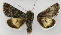 Lasionycta leucocycla leucocycla male